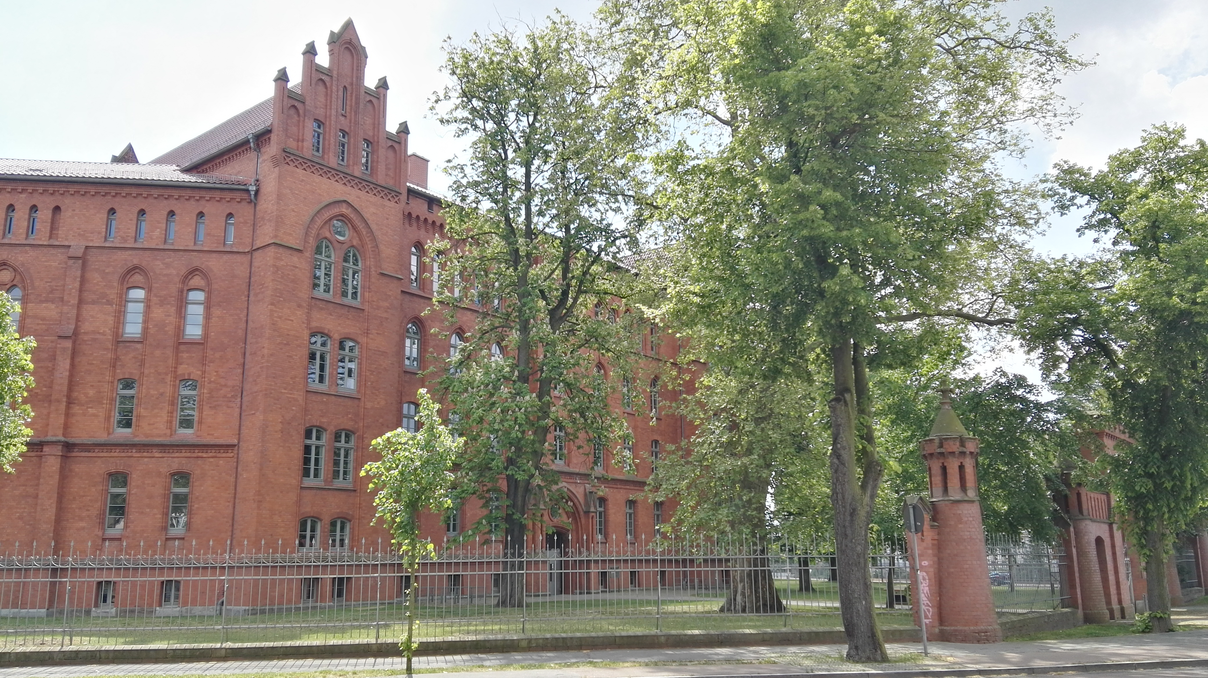 denkmalgeschützte Kavalier-Kaserne in der Lutherstraße 56, 57 in Lutherstadt Wittenberg